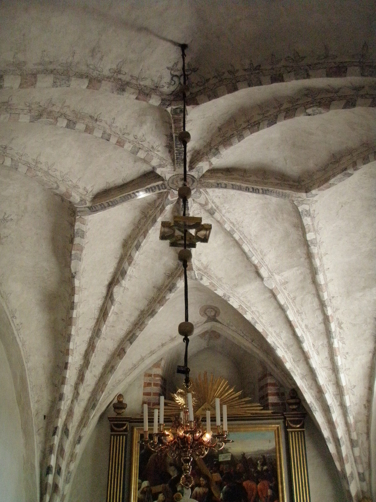 Kalkmålningar i korvalvet. Enligt inskriften på ribborna i valvets hjässa meddelar att det slagits 1463, att arbetet påbörjats vid Urbans tid (25 maj) och slutförts efter den helige Daminius´ fest(27 september), samt att murmästarens namn varit Olov.